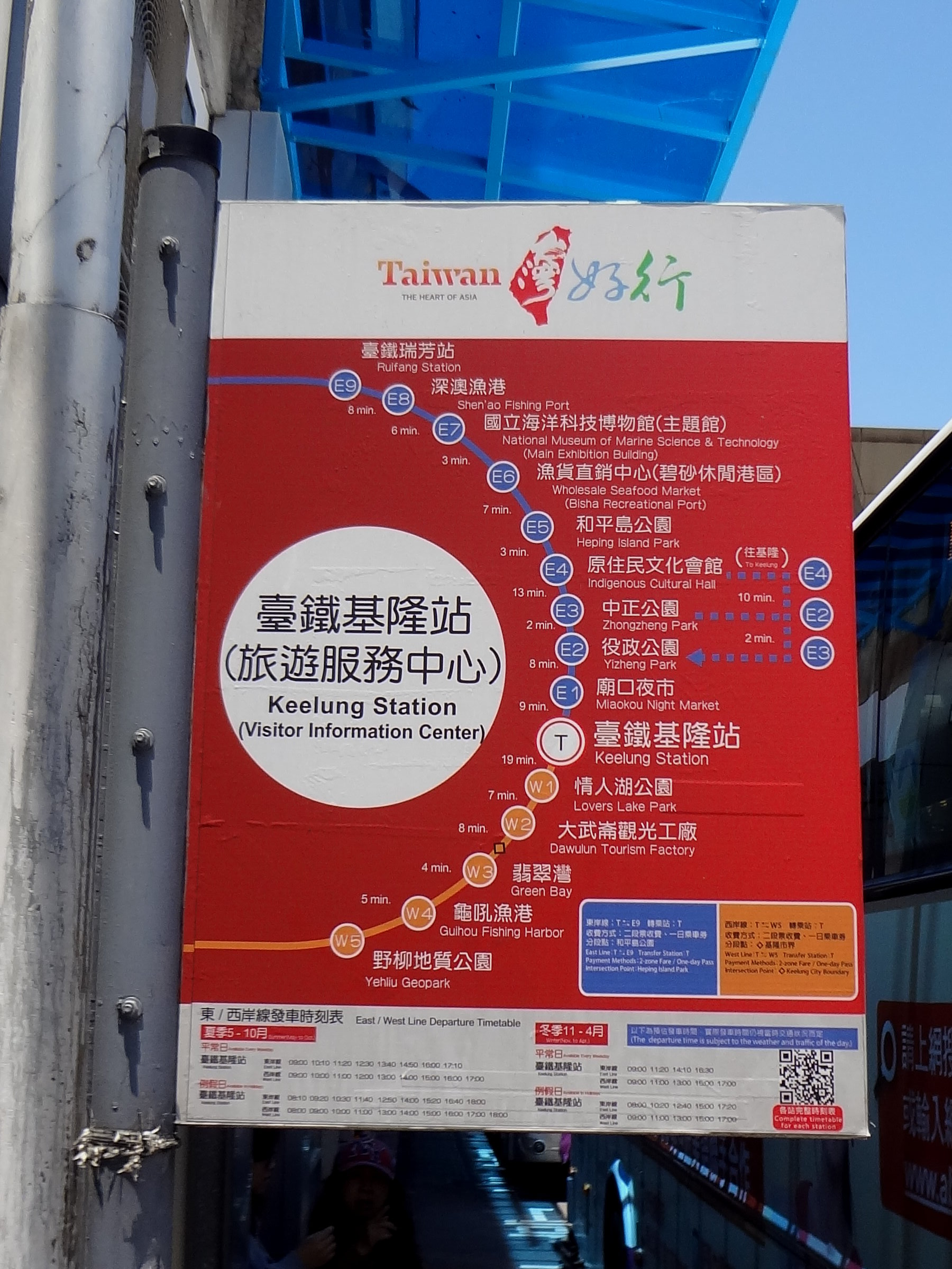 基隆客運經營台灣好行龍宮尋寶線東岸線及西岸線「臺鐵基隆站」站牌。